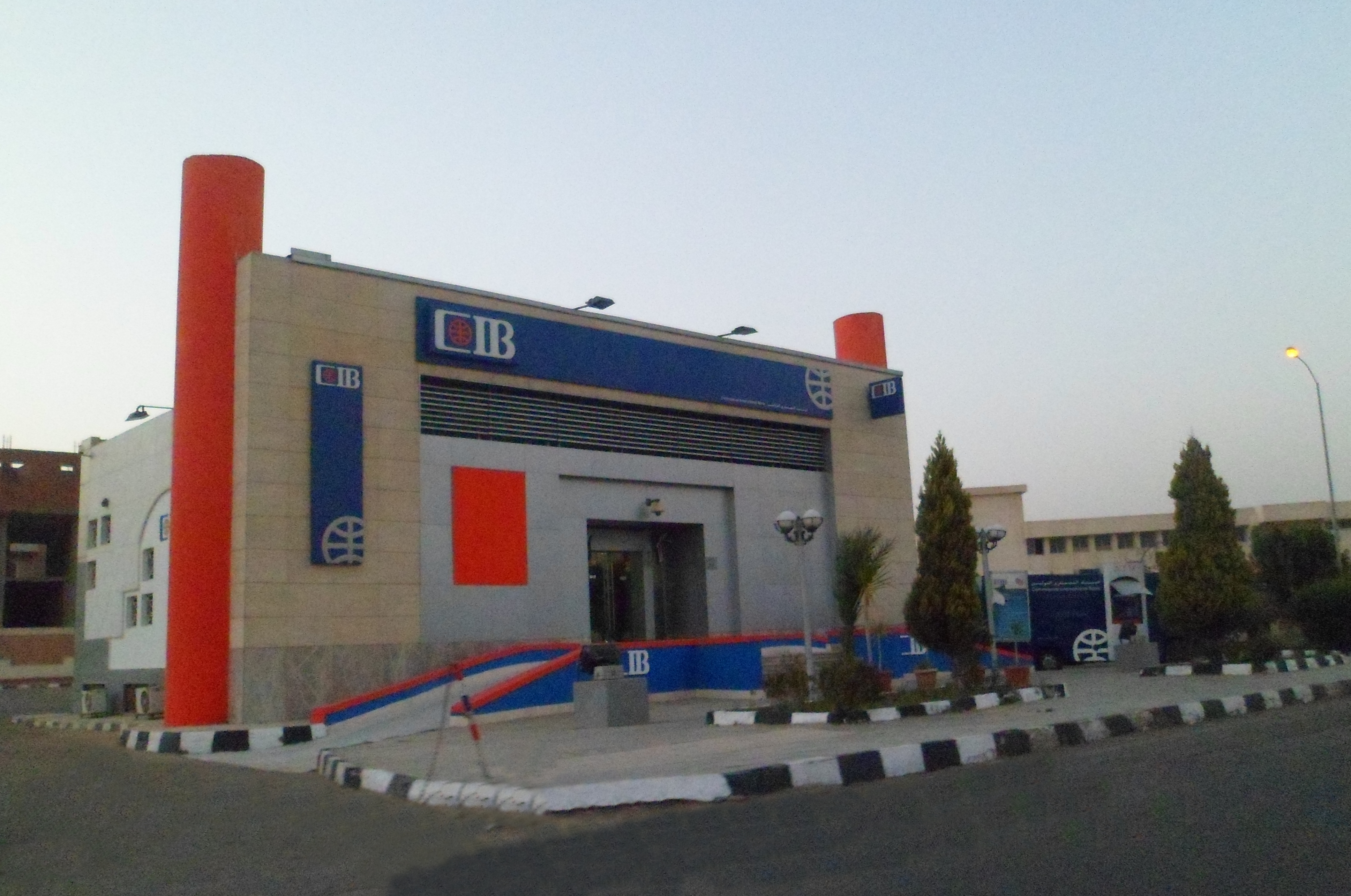 البنك التجاري الدولي بمدينة السادات